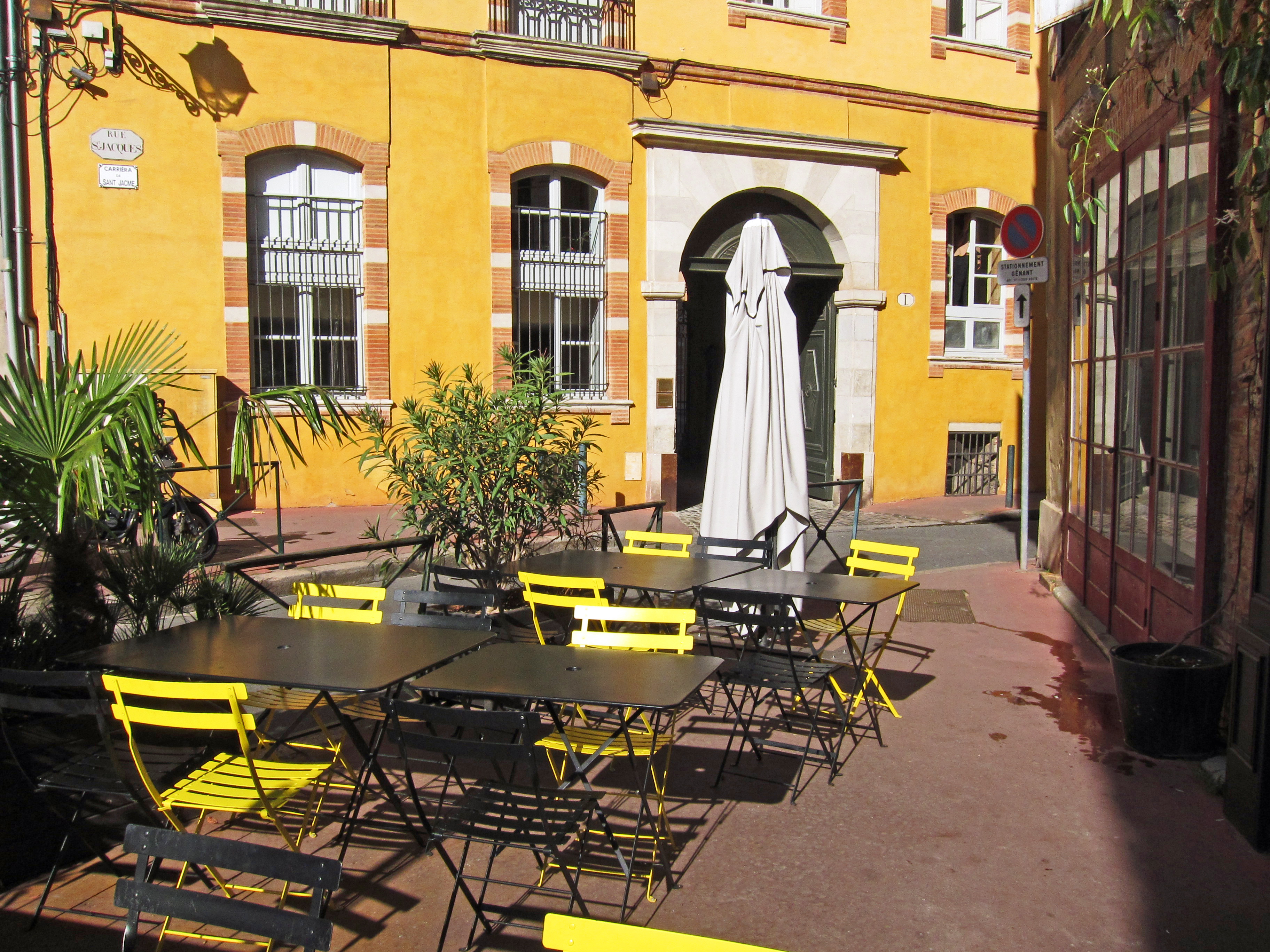 Toulouse (Haute-Garonne, France) : Terrasse d'un restaurant, place Saintes-Scarbes.